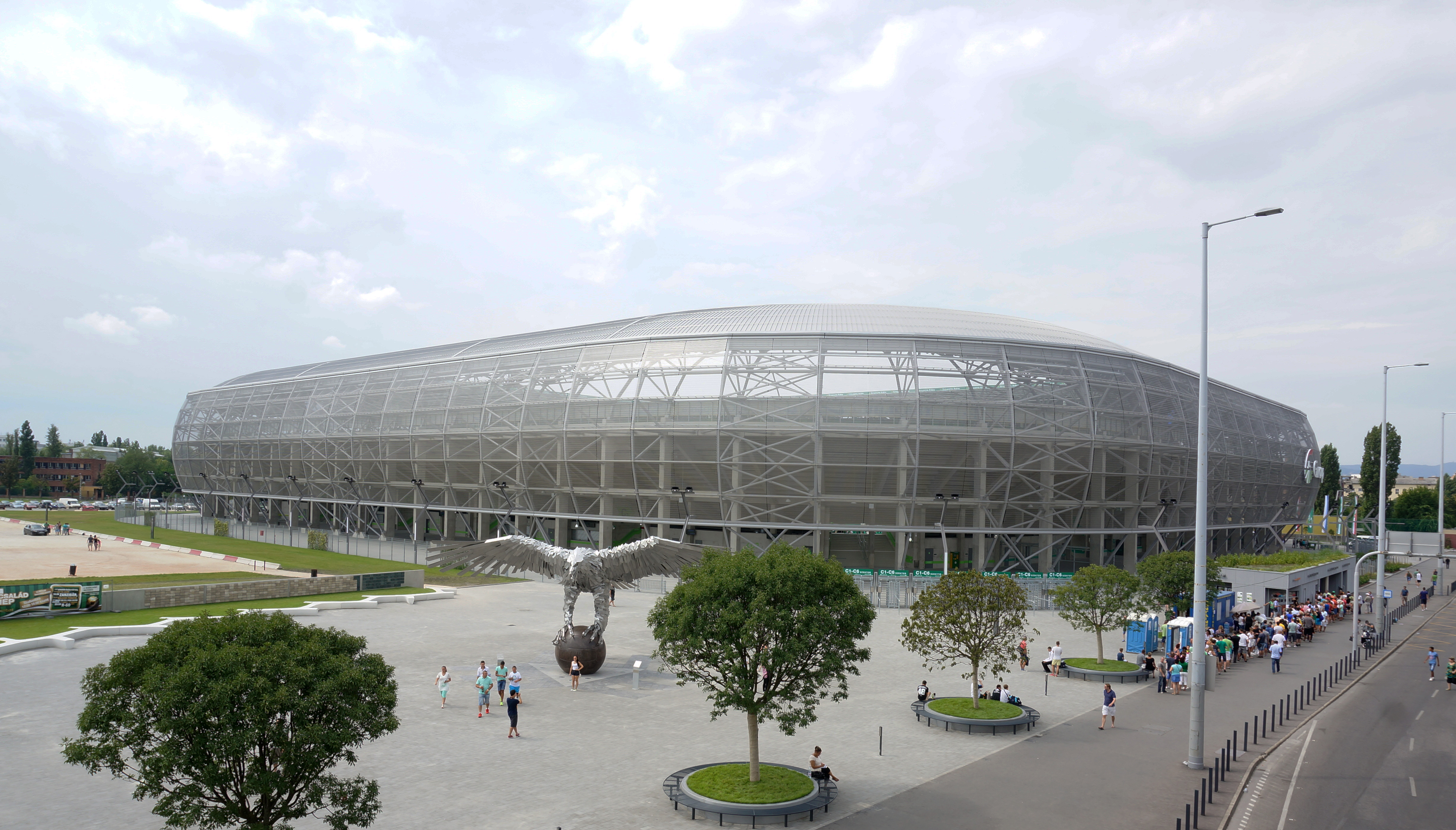 Stade à Budapest.